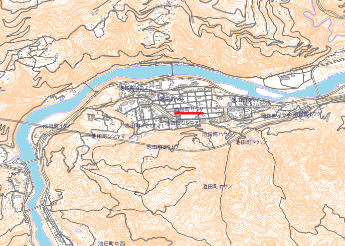 徳島県三好市池田町サラダの位置